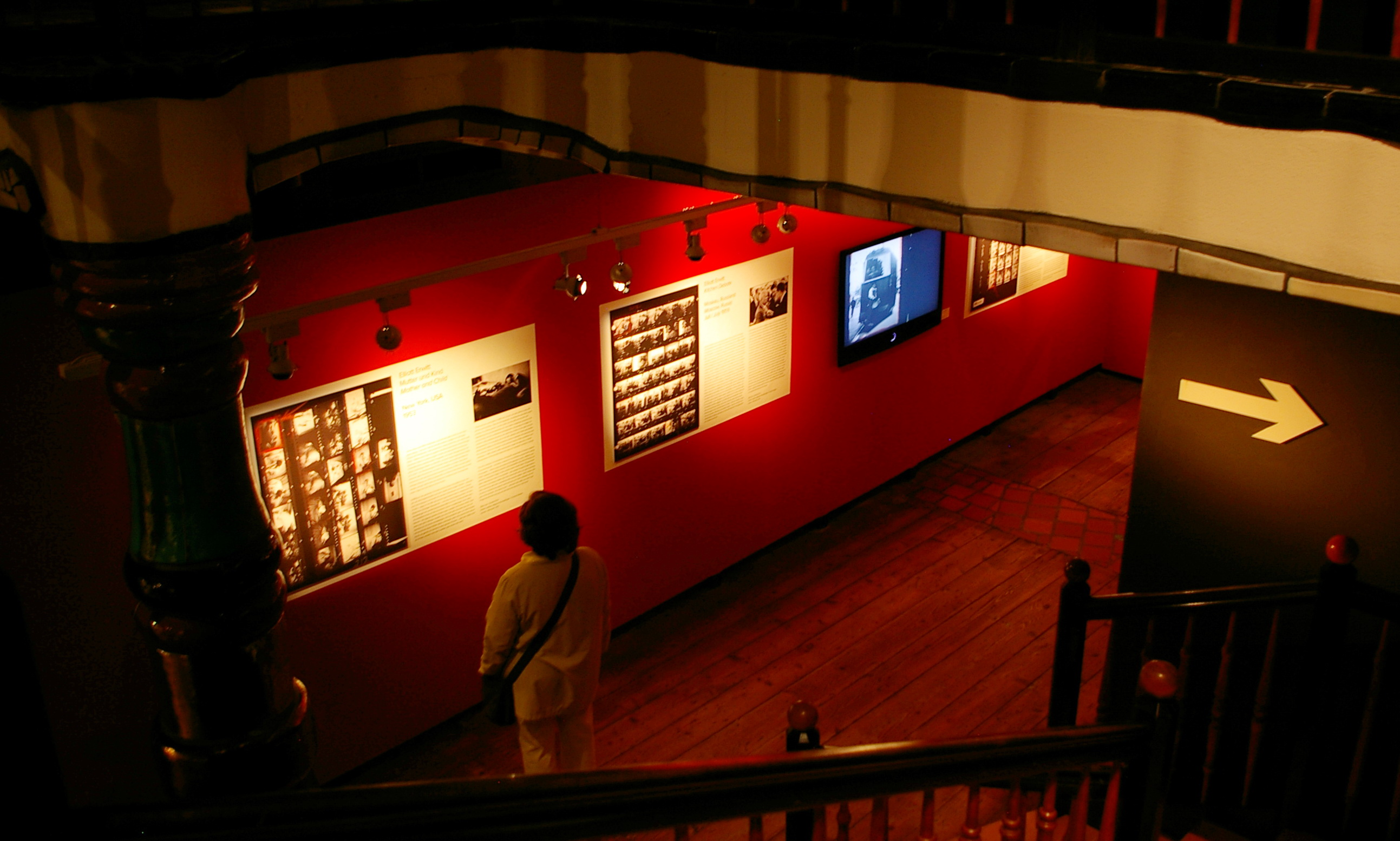 Výstava Elliott Erwitt. Retrospective, KunstHaus, Vídeň, 14. června - 30. září 2012